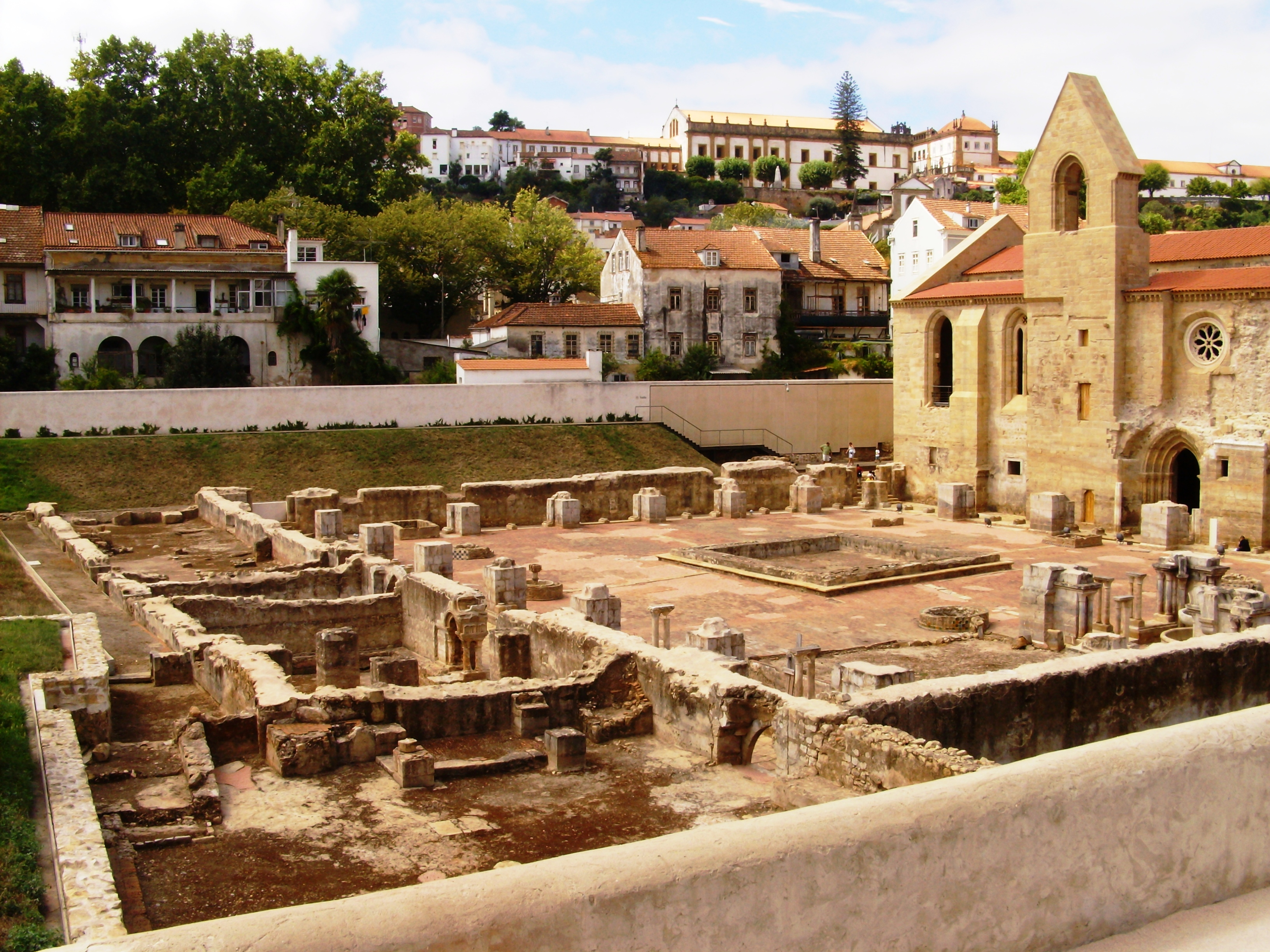 Mosteiro de Santa Clara-a-Velha, Coimbra, Distrito de Coimbra, Portugal: ruínas do antigo claustro.